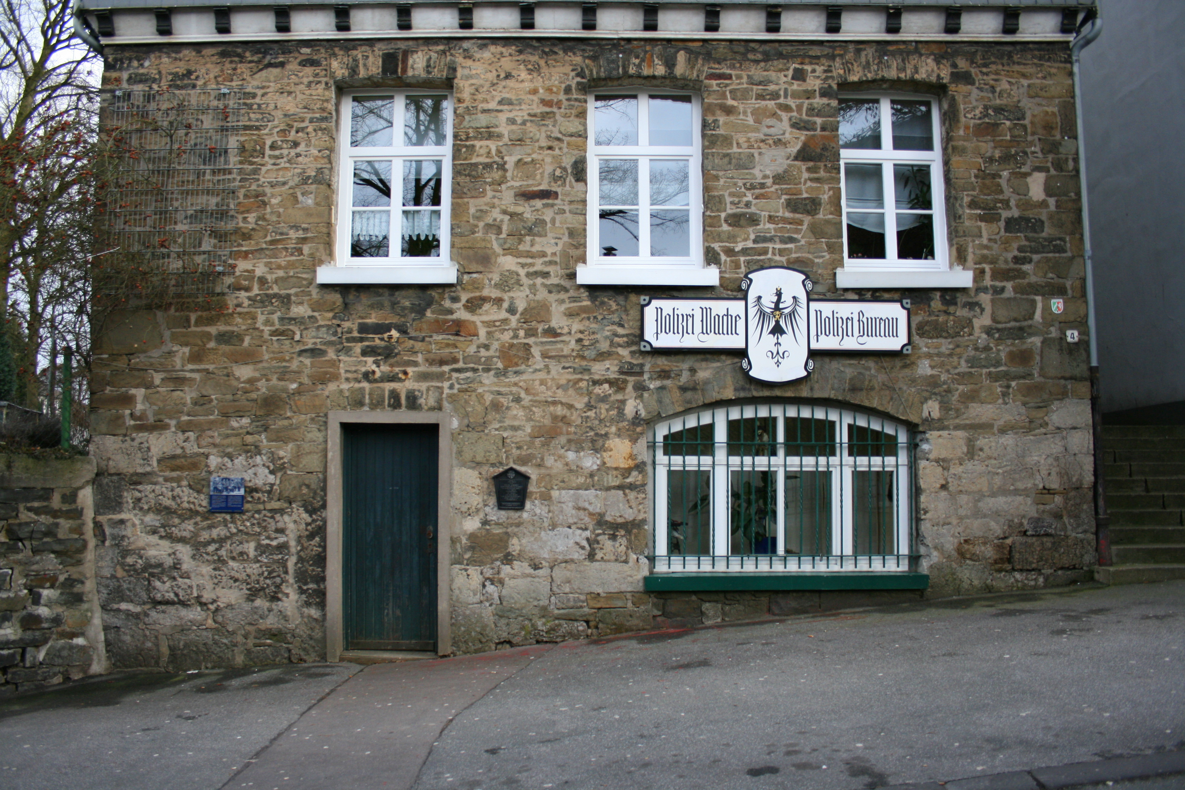 Alte Wache in Wuppertal-Langerfeld